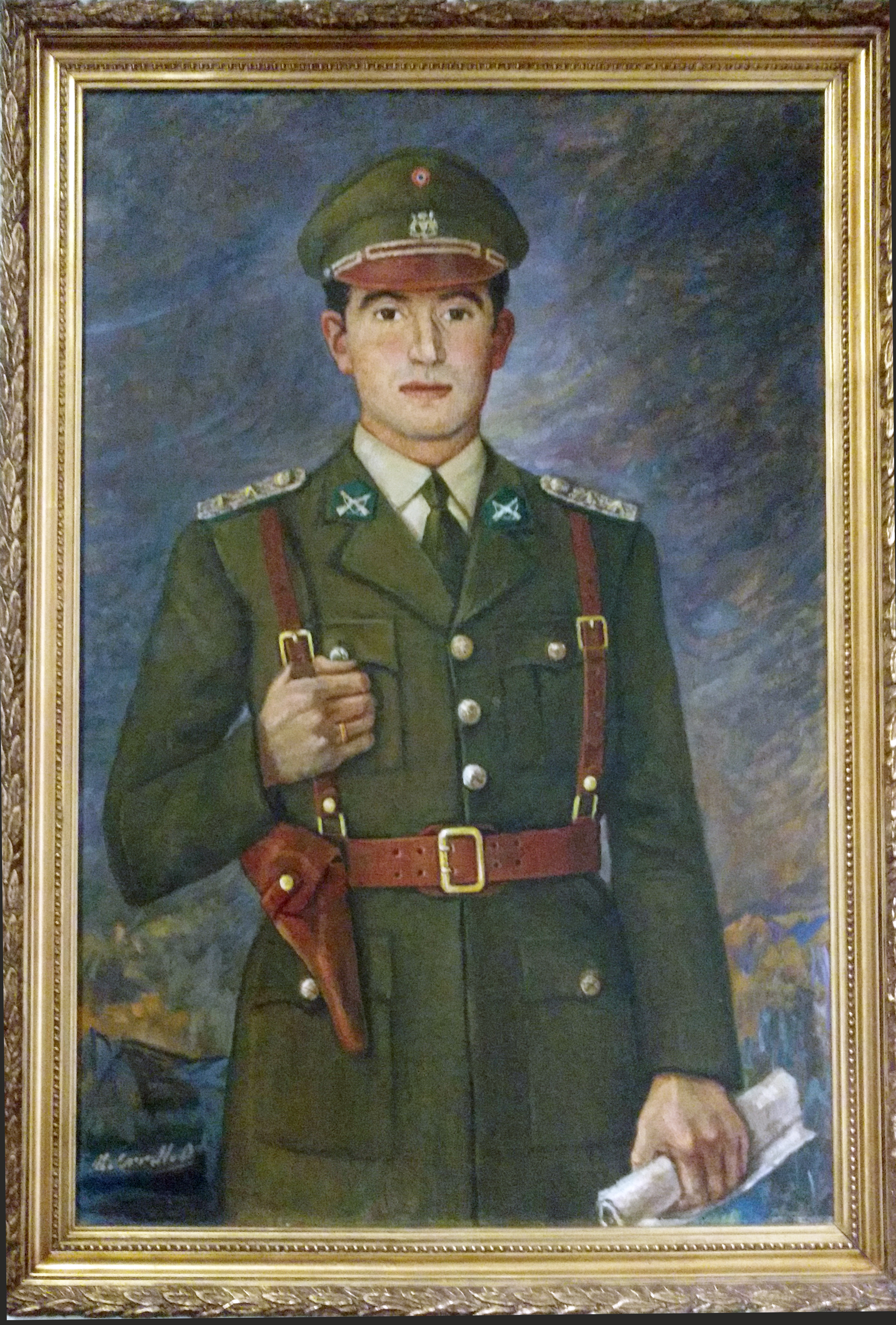 Este cuadro de Hernán Merino Correa se encuentra en el Museo Histórico Carabineros de Chile.